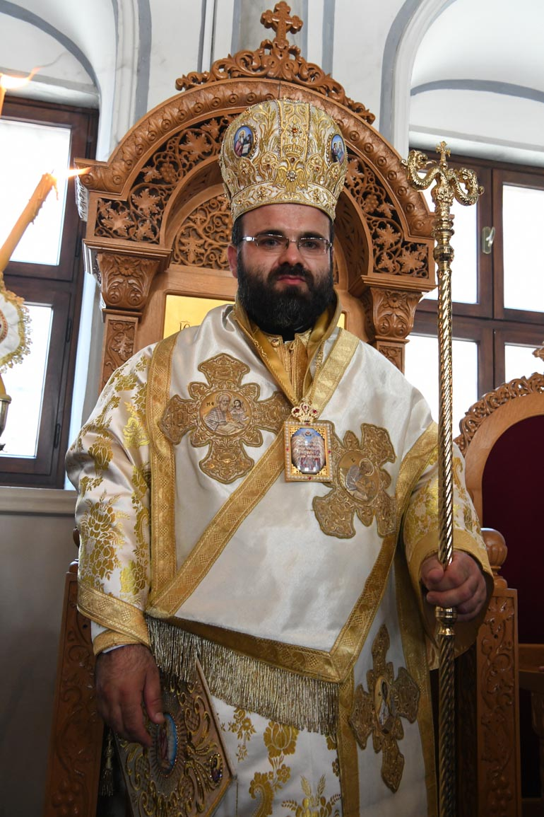 Епископ Евдокиадский Амвросий в день своей хиротонии в епископа Евдокиады, викария Писидийской митрополии